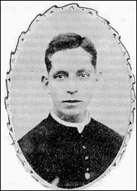 Agustin Caloca Cortés